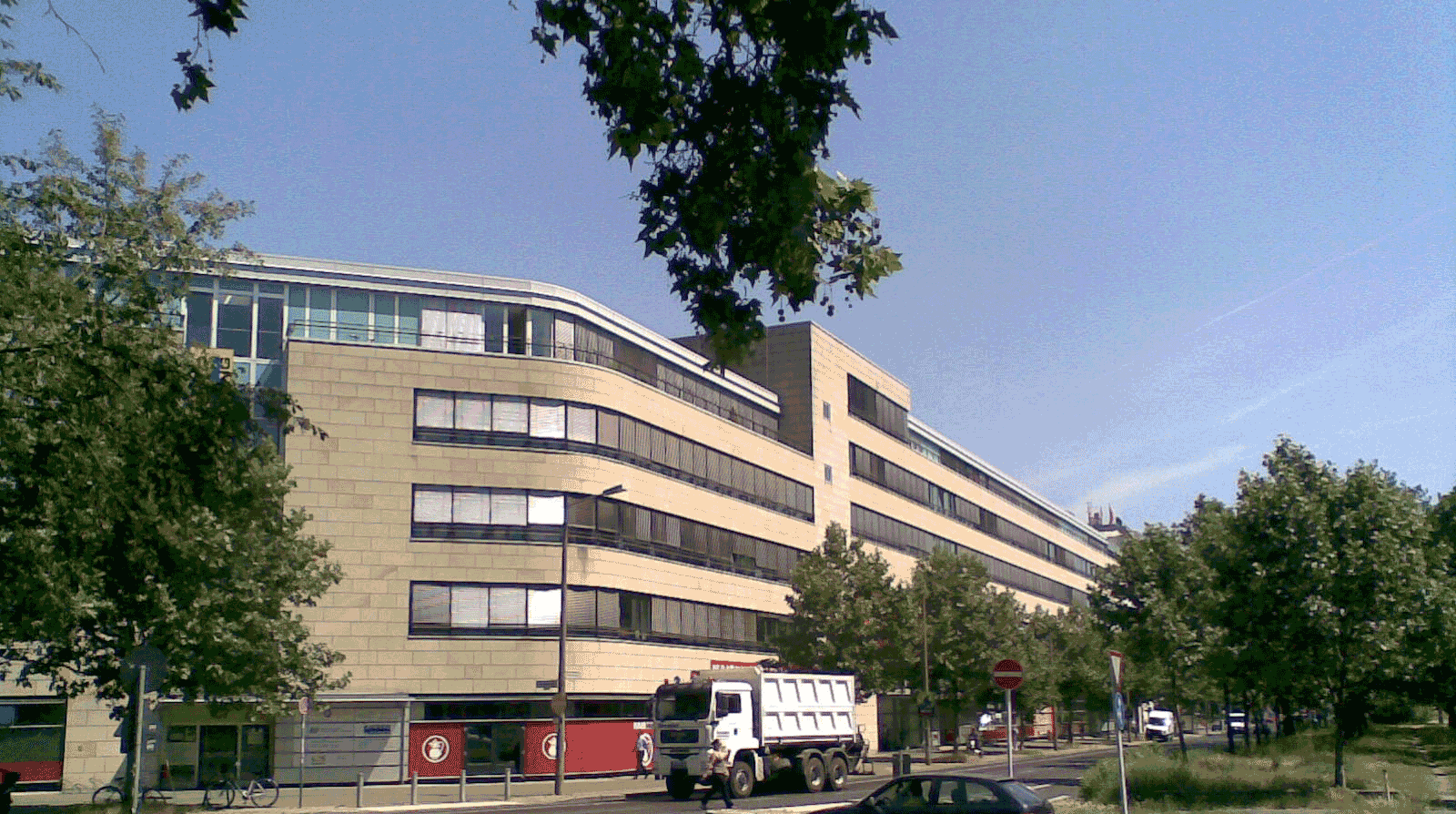 Der Gewerbebau an der Greifswalder Straße aus dem Jahre 2002